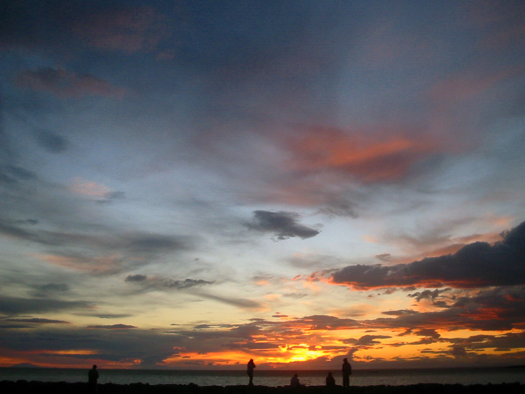 stunning view.